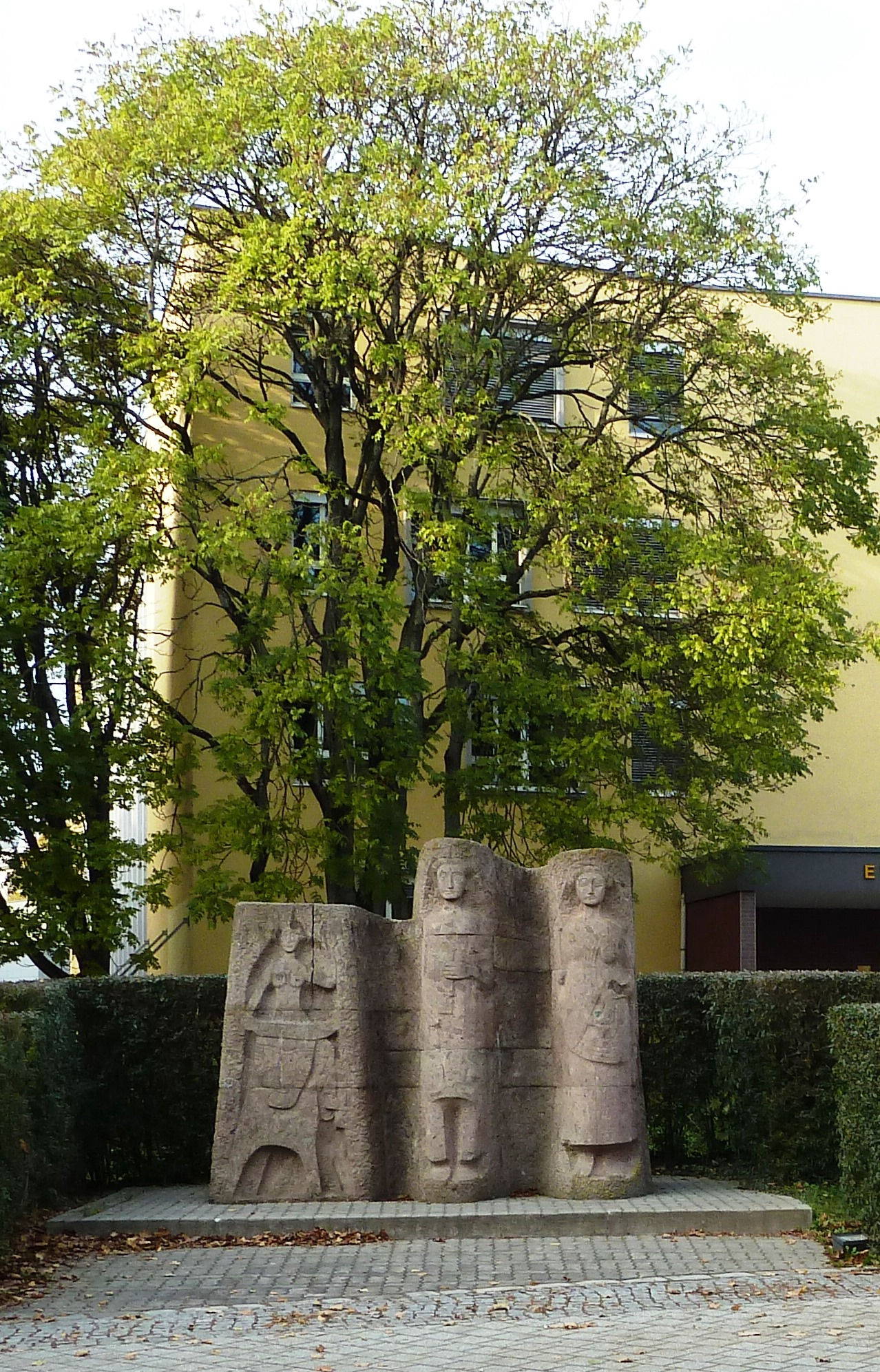 Europadenkmal bei Europaschule in Linz